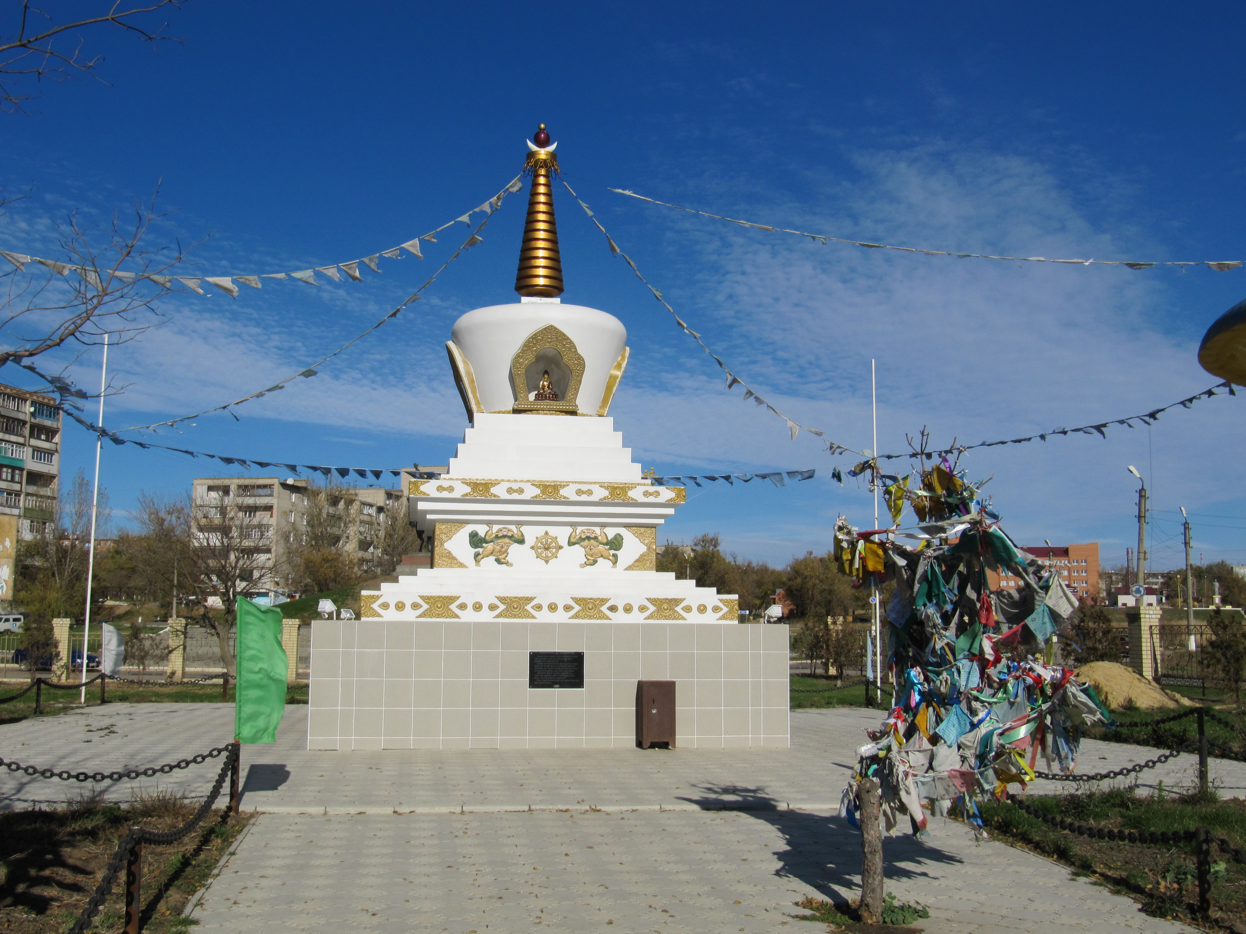 Субурган, 5 мкрн., Элиста, Калмыкия